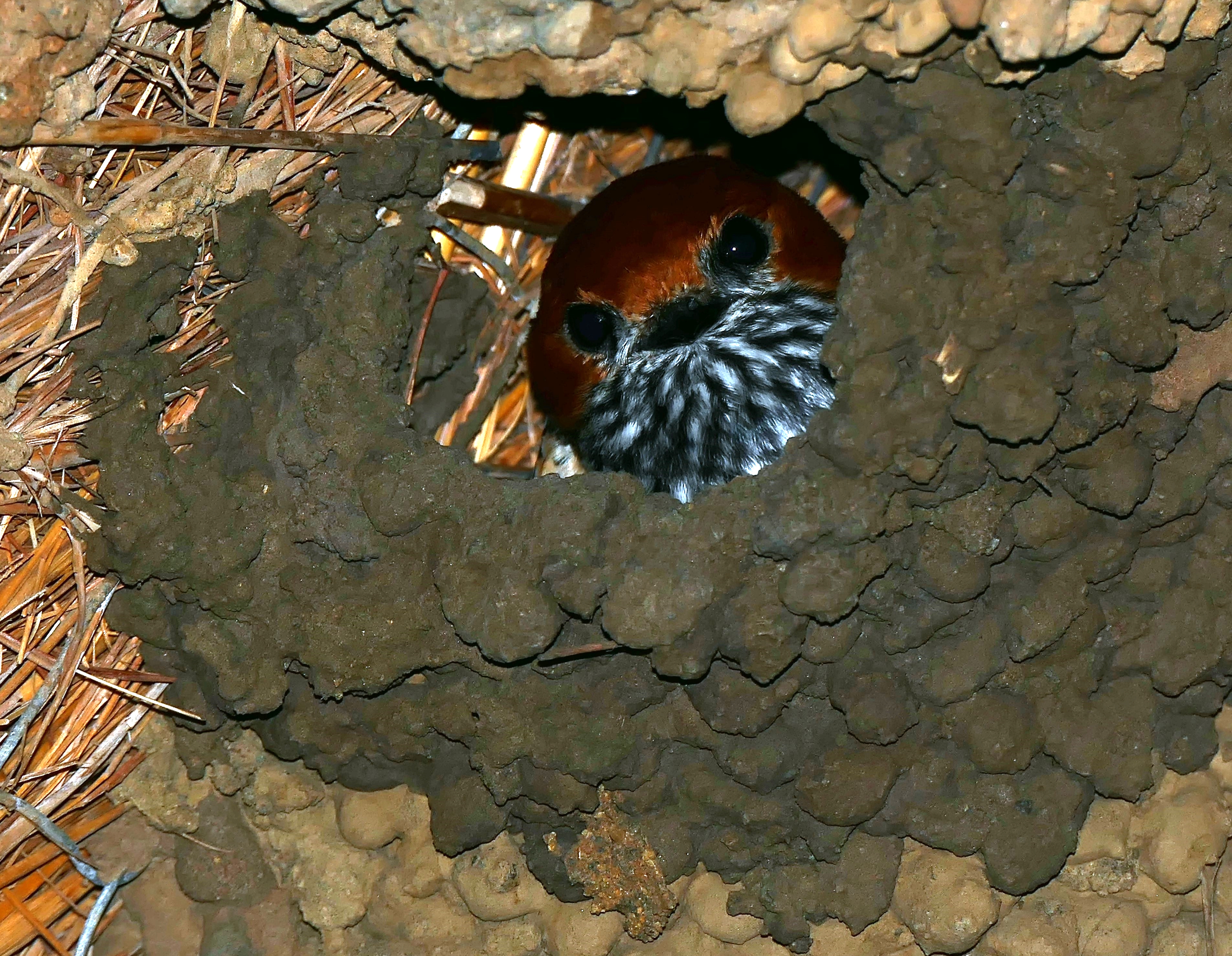 Umbondwe Picnic Site, Hluhluwe-iMfolozi Park, Kwazulu-Natal, SOUTH AFRICA